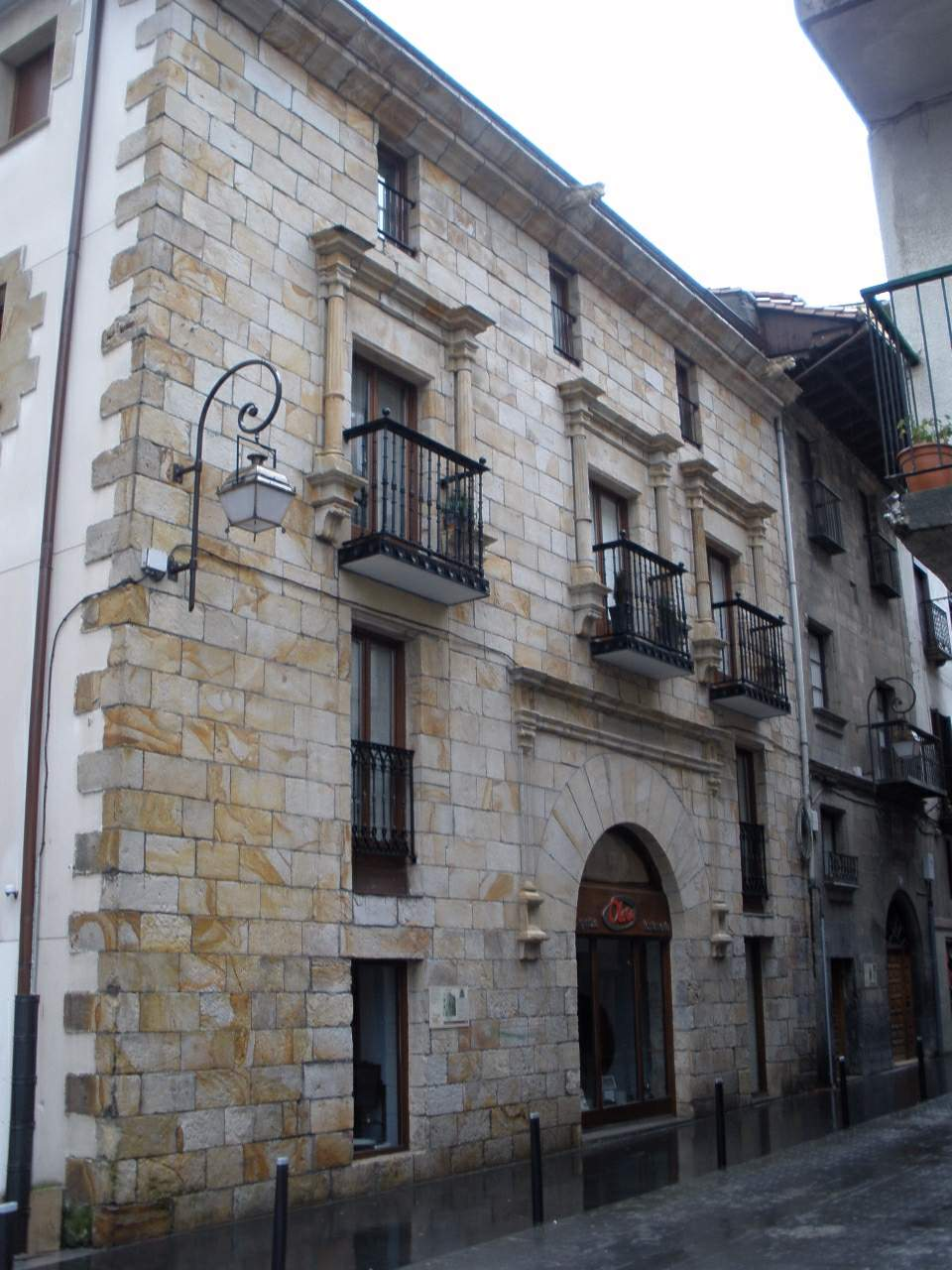 Casa Factorecua (Urretxu, Gipúzkoa)